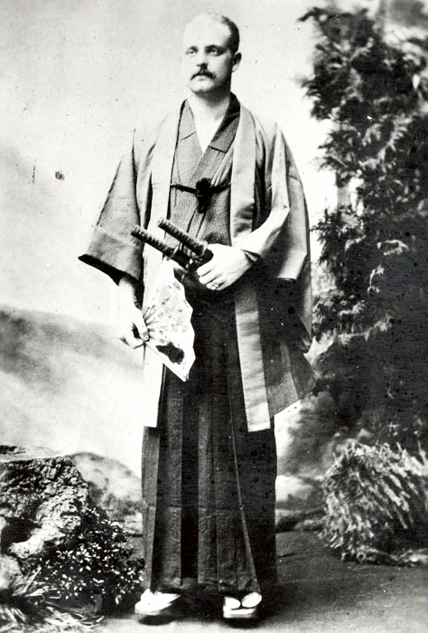 Príncipe Dom Augusto Leopoldo de Saxe-Coburgo e Bragança em trajes típicos japoneses durante escala da viagem de circunavegação do Cruzador Almirante Barroso no Japão (1889).